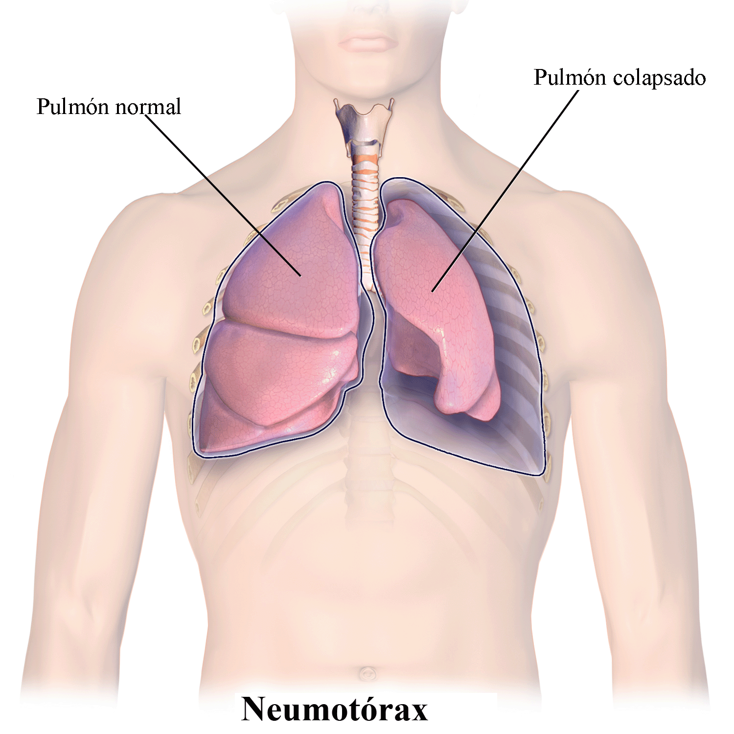 Neumotórax. Ver una animación completa de este tema médico [1]